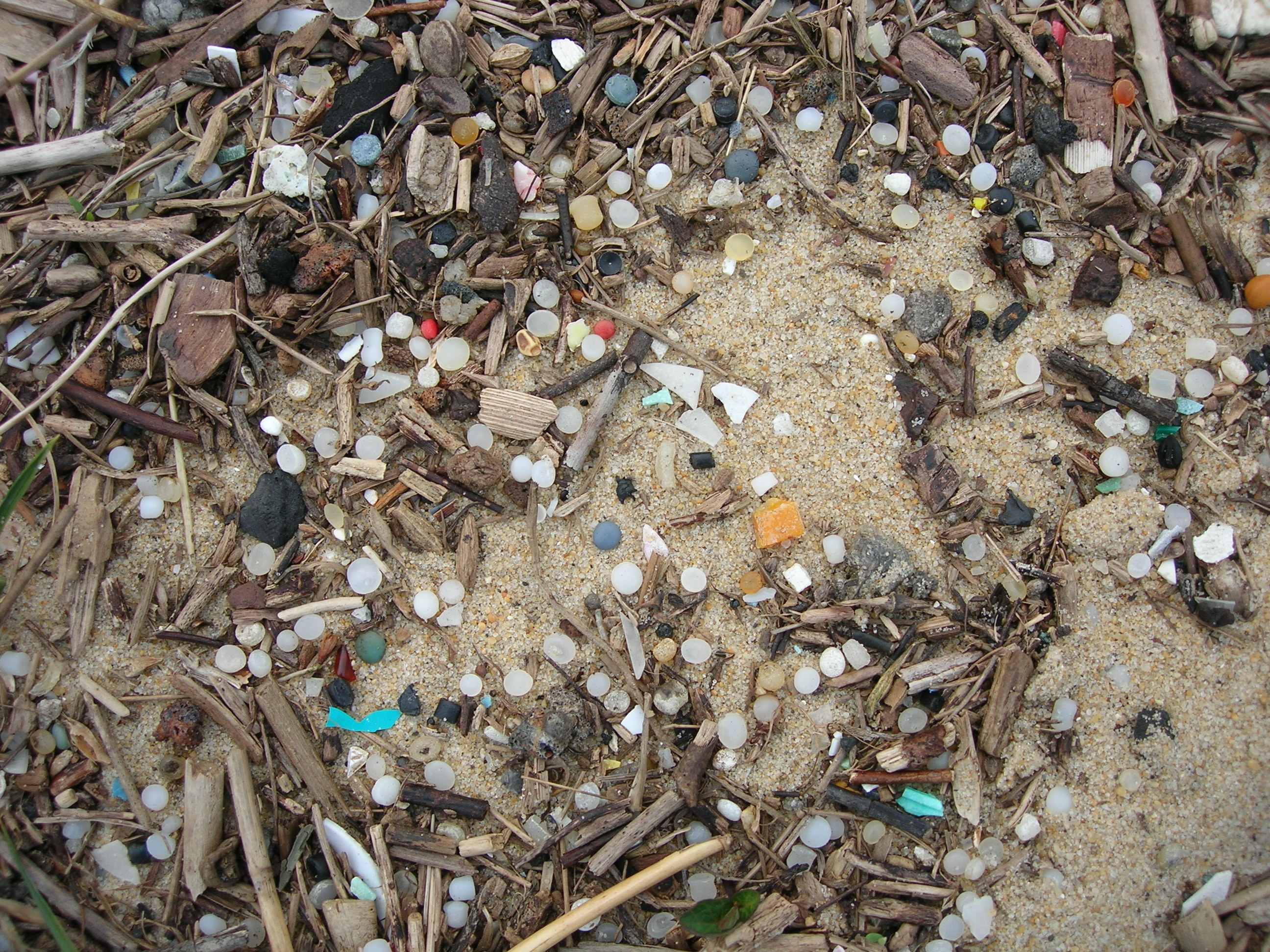 Granulés plastiques industriels ou "larmes de sirène" de couleurs blanches, ambrées, noires, rouges... Plage de la côte Aquitaine (réserve naturelle nationale) Ænglisc: Plastic pellets, industrials granules, nurdles or mermaids' tears of colors white, amber, black, red ... southwest of France (sandbeach)